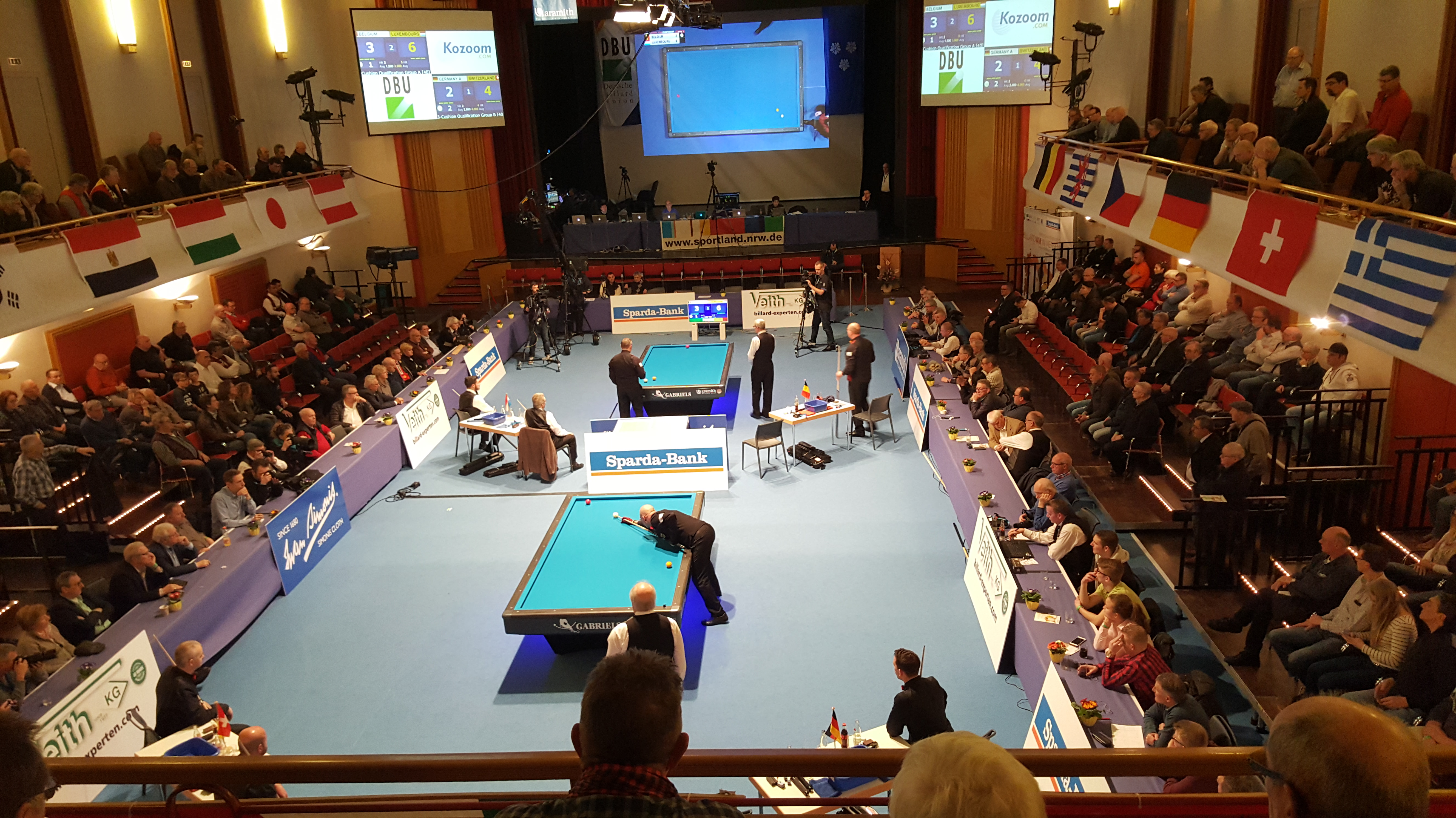 Venue: Festhalle Viersen